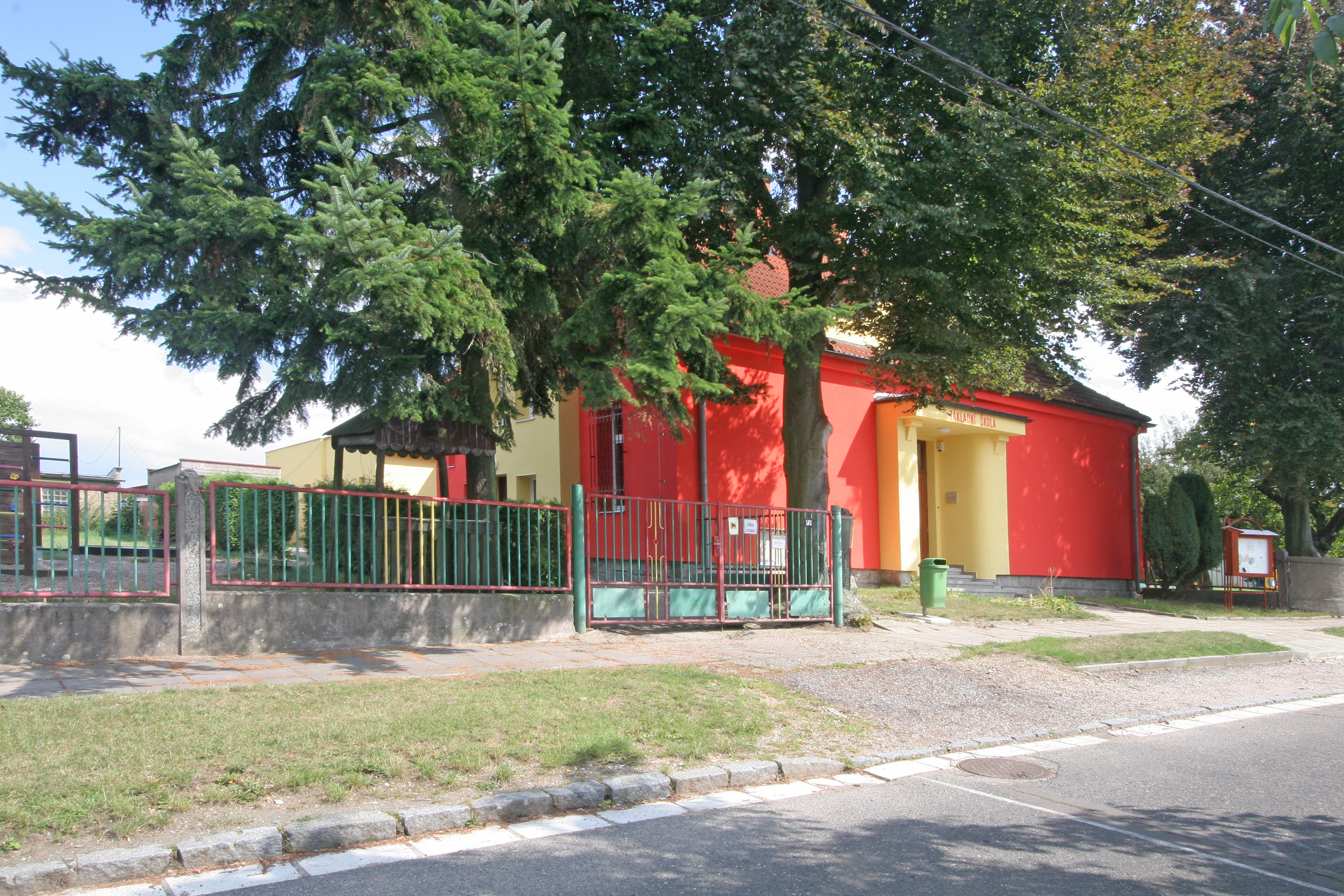 Rasošky škola